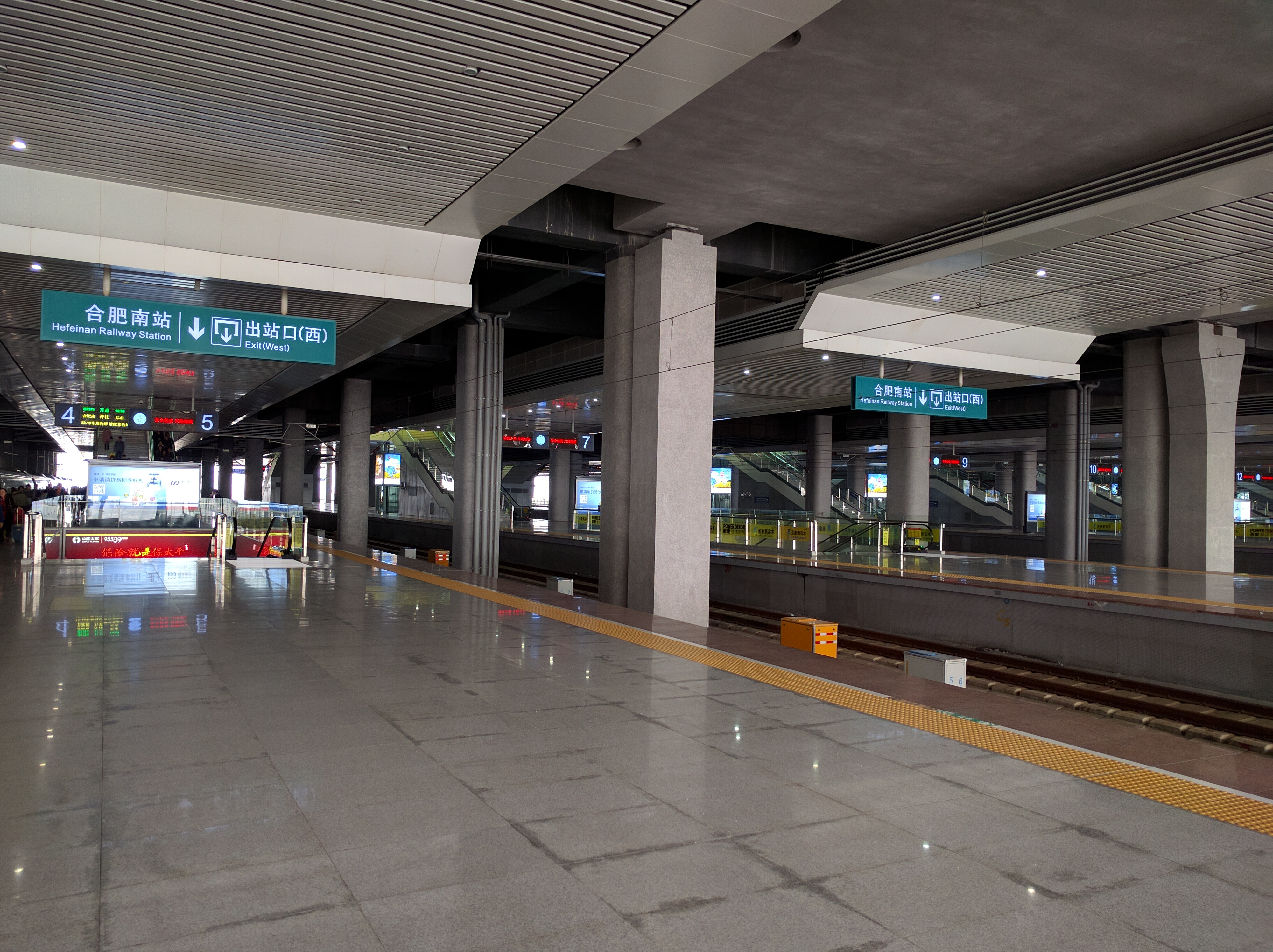 中文（中国大陆）: 火车合肥南站站台